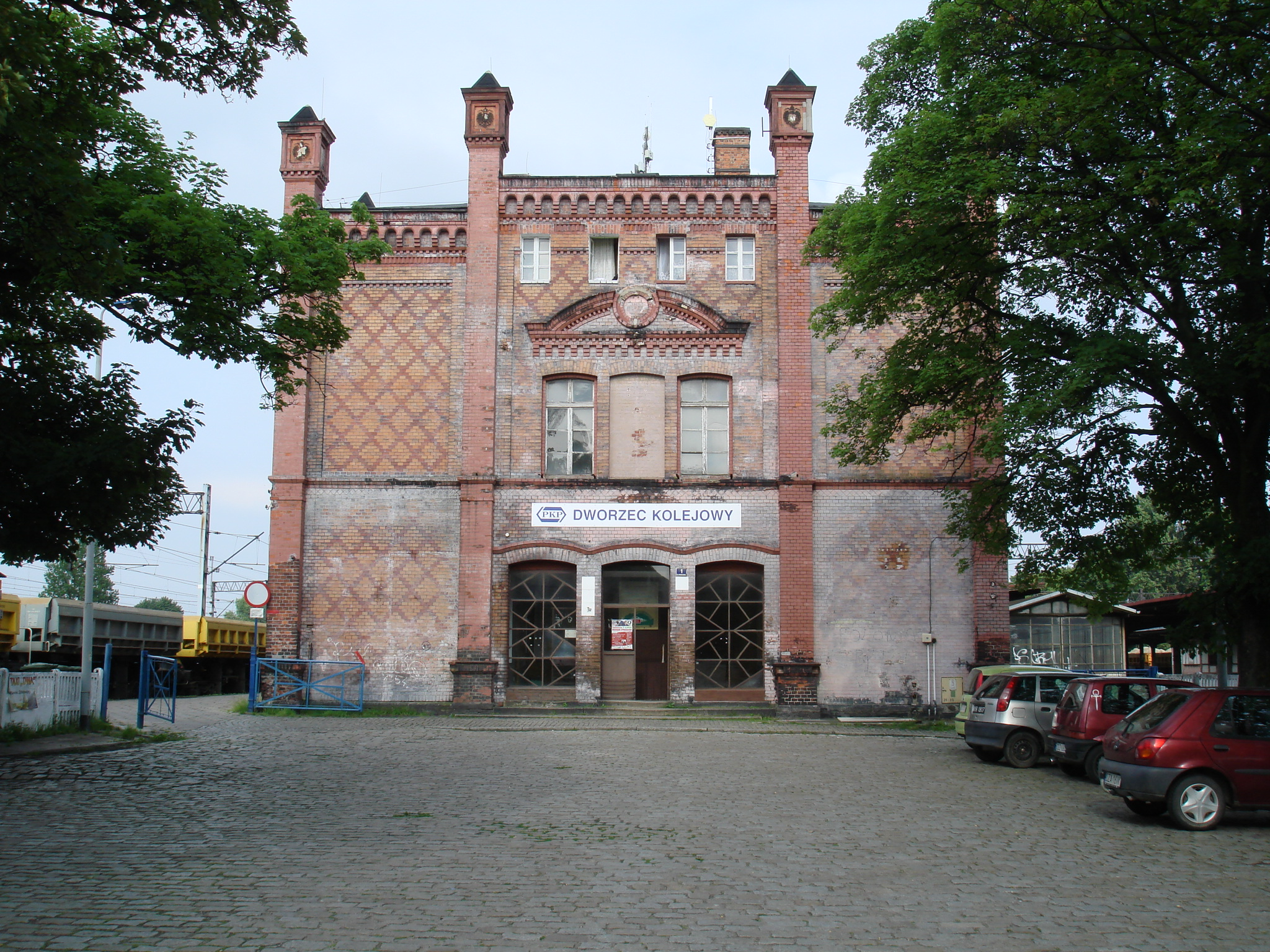 Train Station in Kamieniec Ząbkowicki, Poland (before 1946: Bahnhof Kamenz)